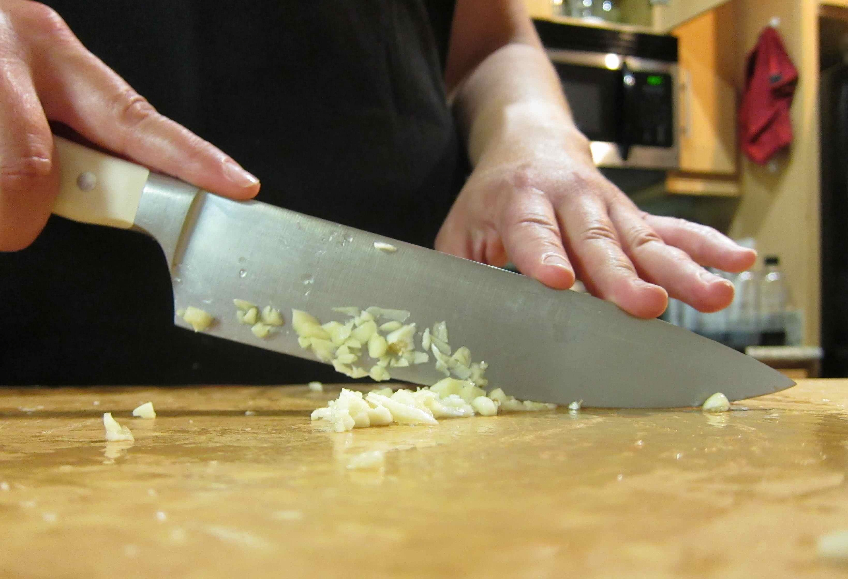 Wiegen von Knoblauch mit einem großen Kochmesser